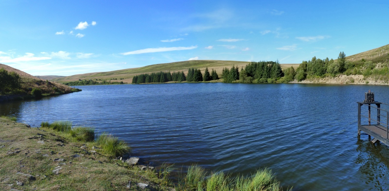 Lac de la Terrisse - Commune de Vèze - Cézallier - Cantal - France